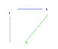 Posição de uma reta, feito por Guilherme Augusto de Matheucci e Silva Teixeira Position of a straight line, made by Guilherme Augusto de Matheucci e Silva Teixeira